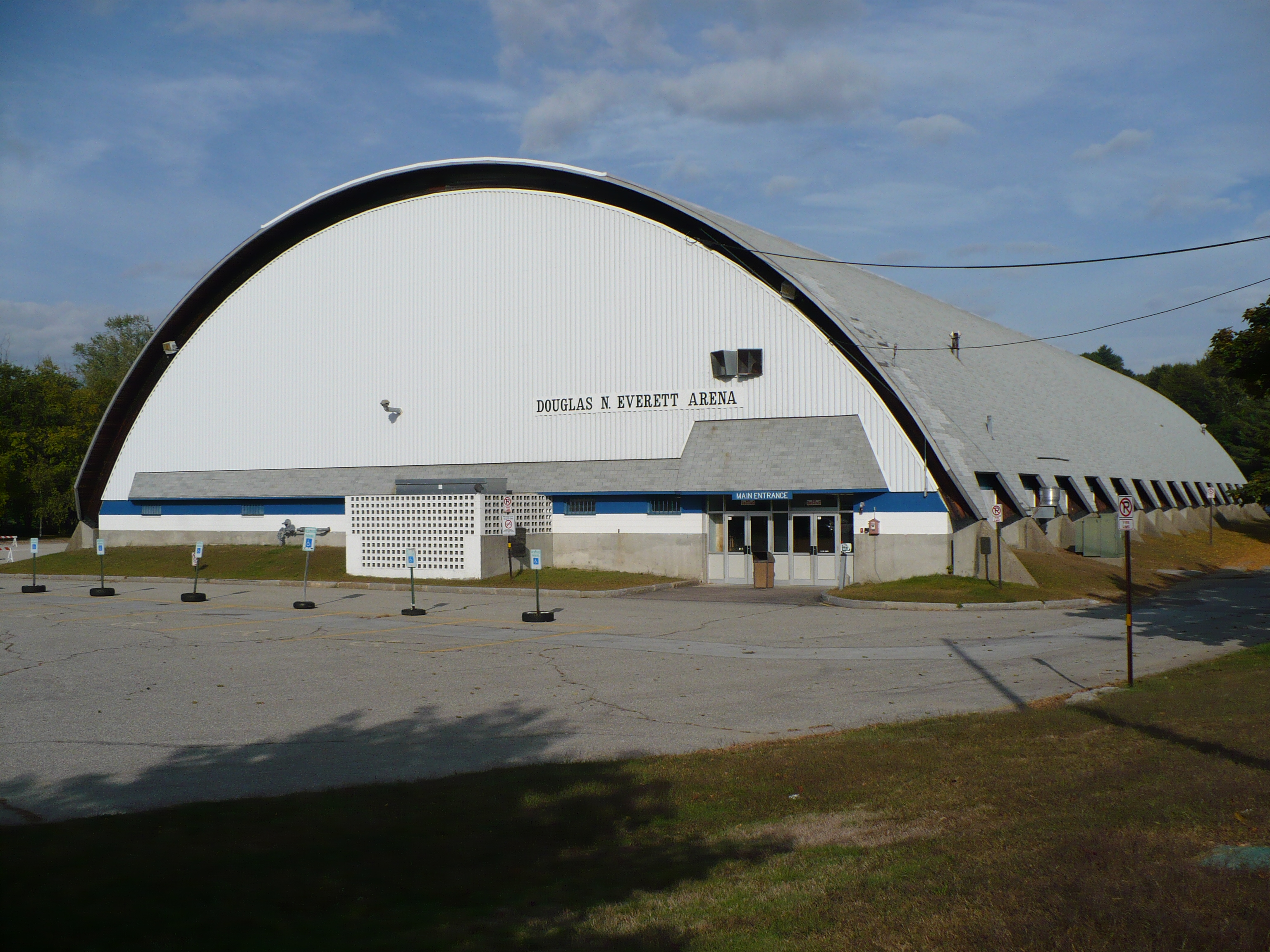 Douglas N. Everett Arena